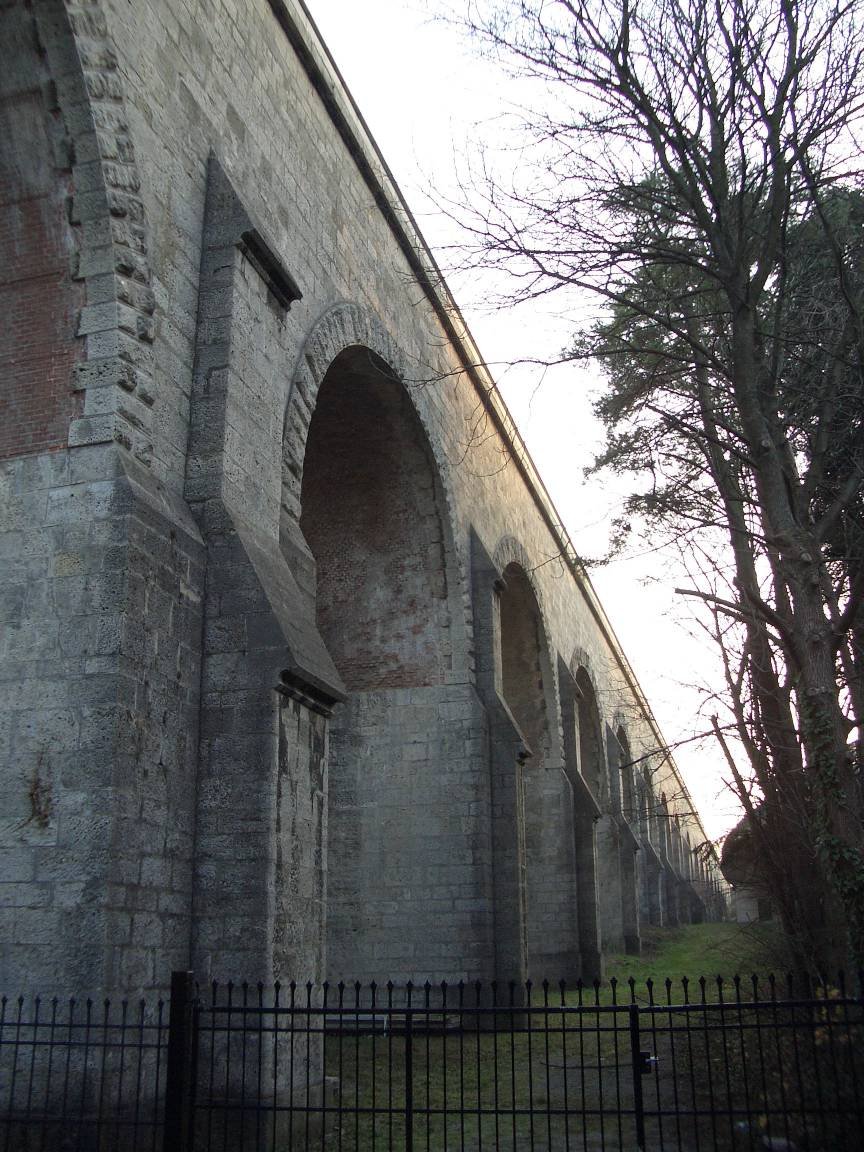 Aquädukt der Wiener Hochquellleitung in Baden